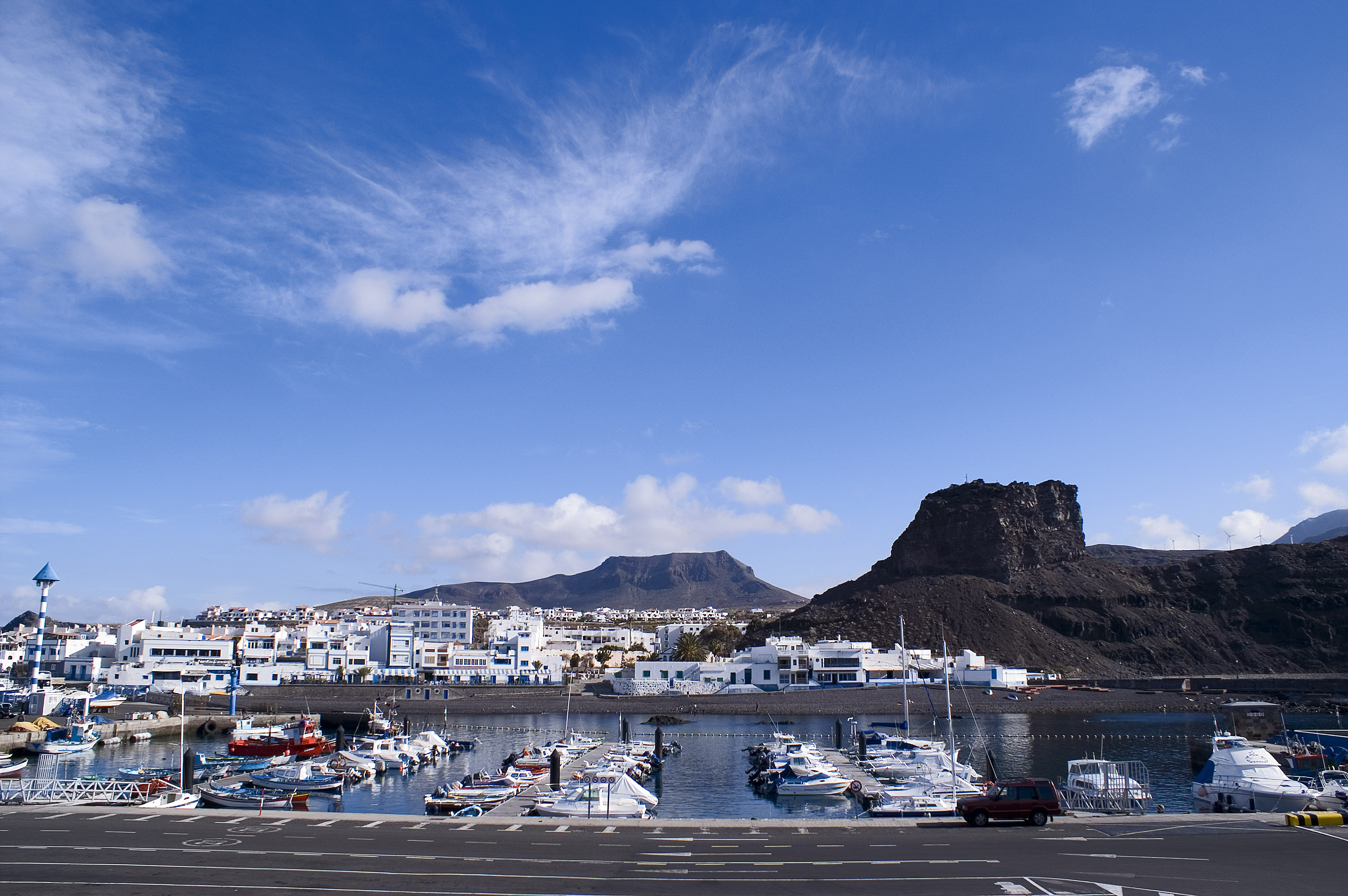 Bildbeschreibung: Puerto de las Nieves, Agaete (Gran Canaria) Quelle: selbst fotografiert Fotograf/Zeichner: Guido Haeger (eMail: wikipedia [ a t ] haeger [ d o t ] de) Datum: Dezember 2005